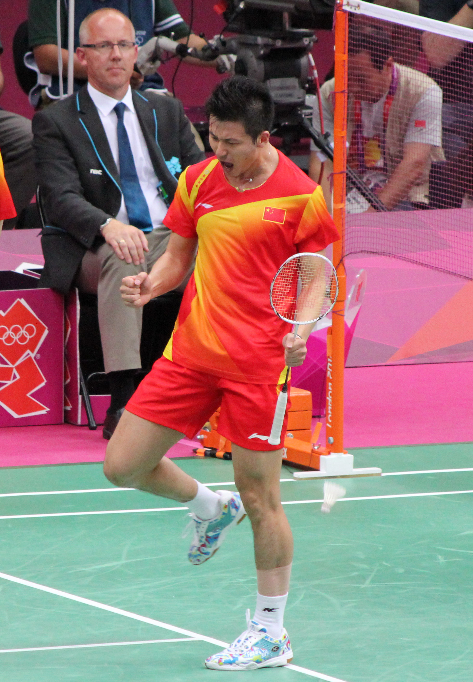 蔡贇於2012年倫敦奧運羽球男子雙打決賽。